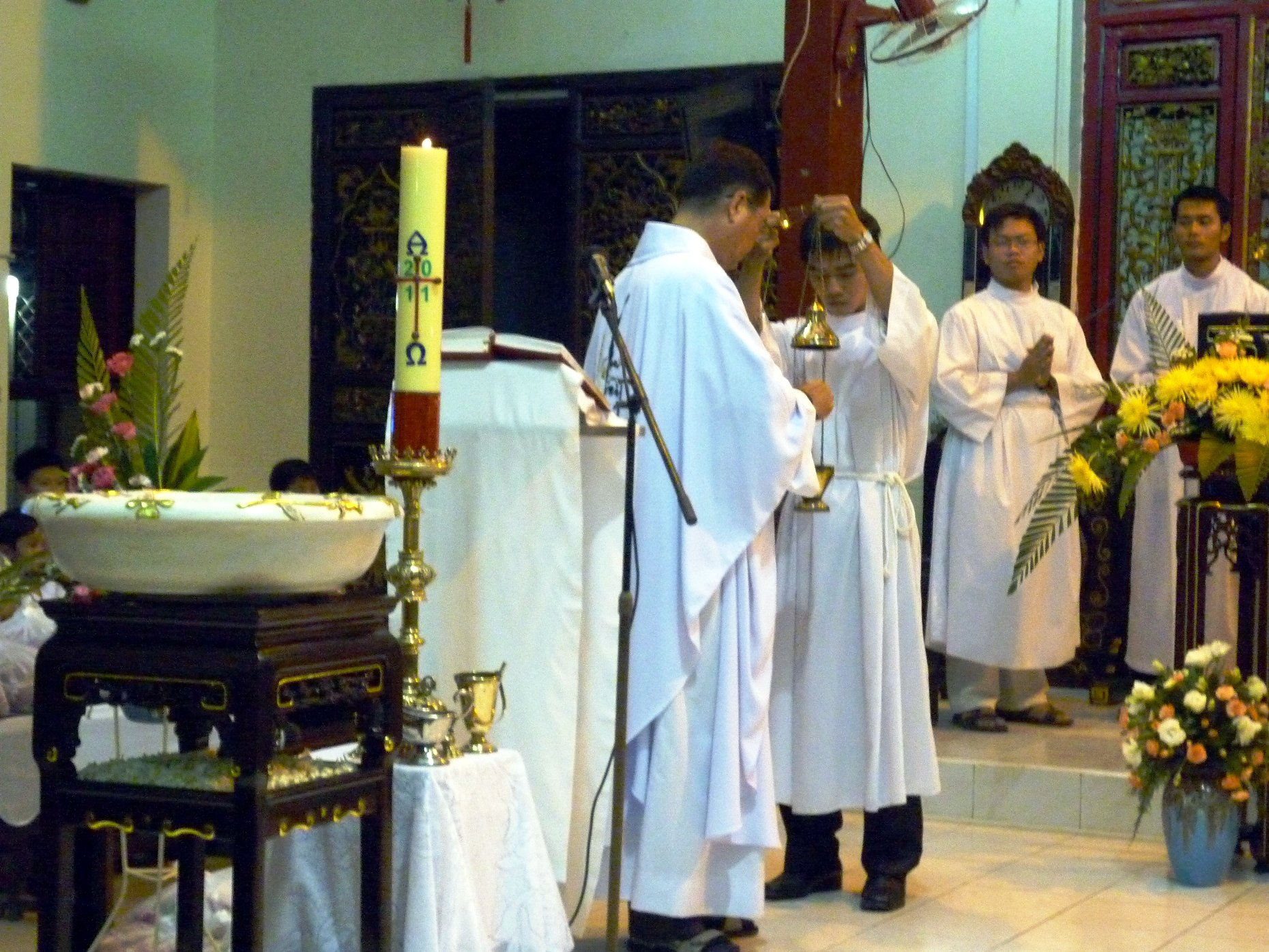 Nghi thức phụng vụ trong lễ Phục Sinh